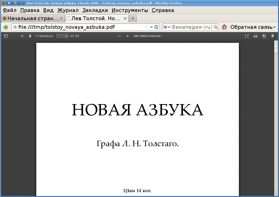 Firefox 19.0b4 на русском языке. Просмотр PDF встроенными средствами.